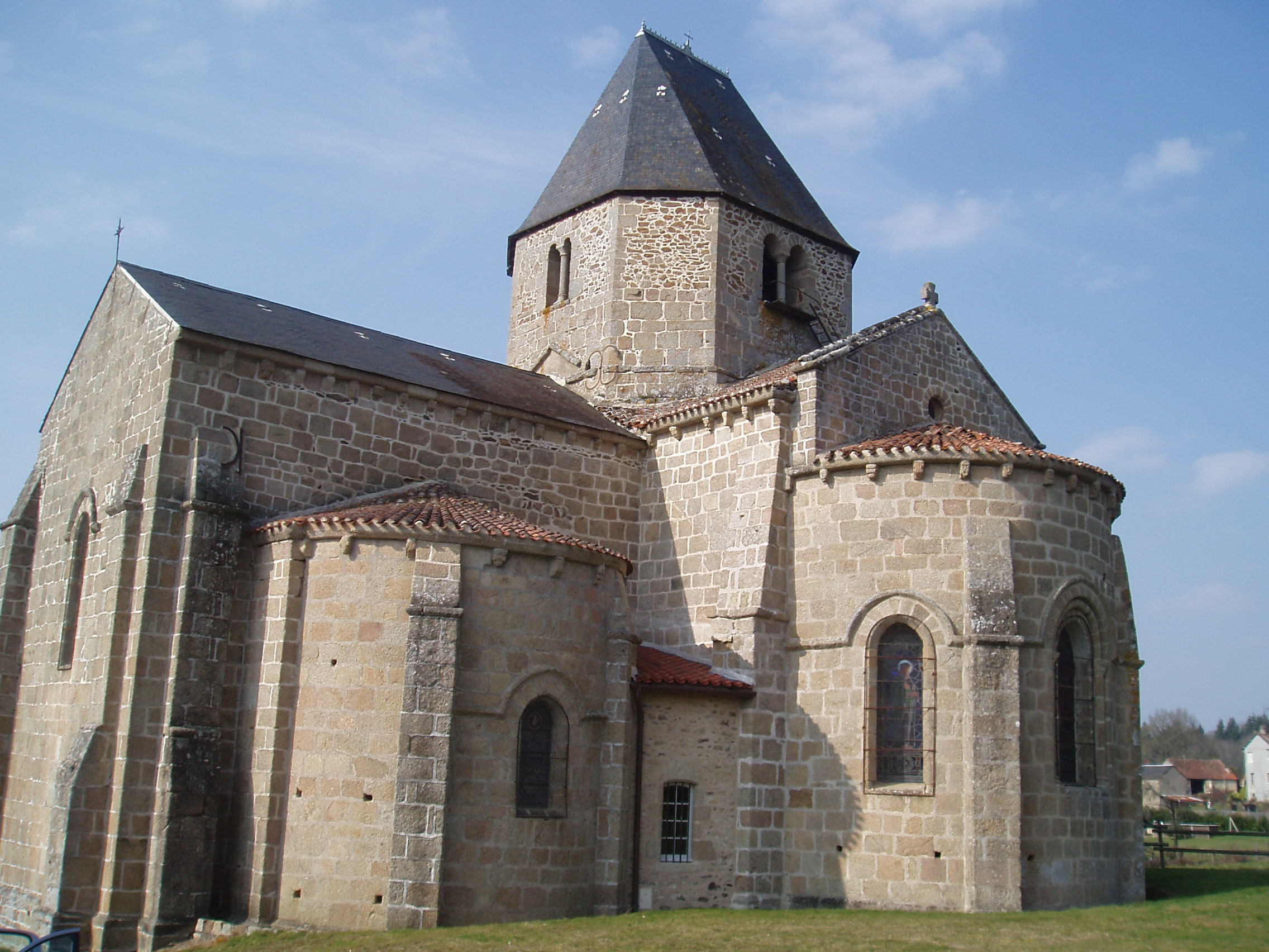 église